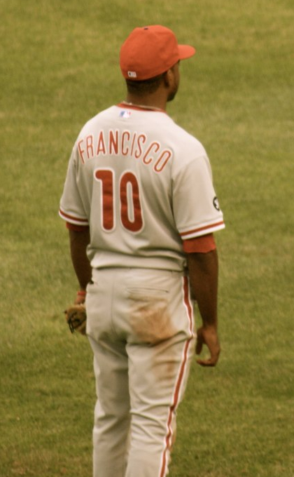 Ben Francisco